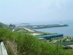 中文（台灣）: 澎湖縣員貝嶼員貝港港灣俯瞰。